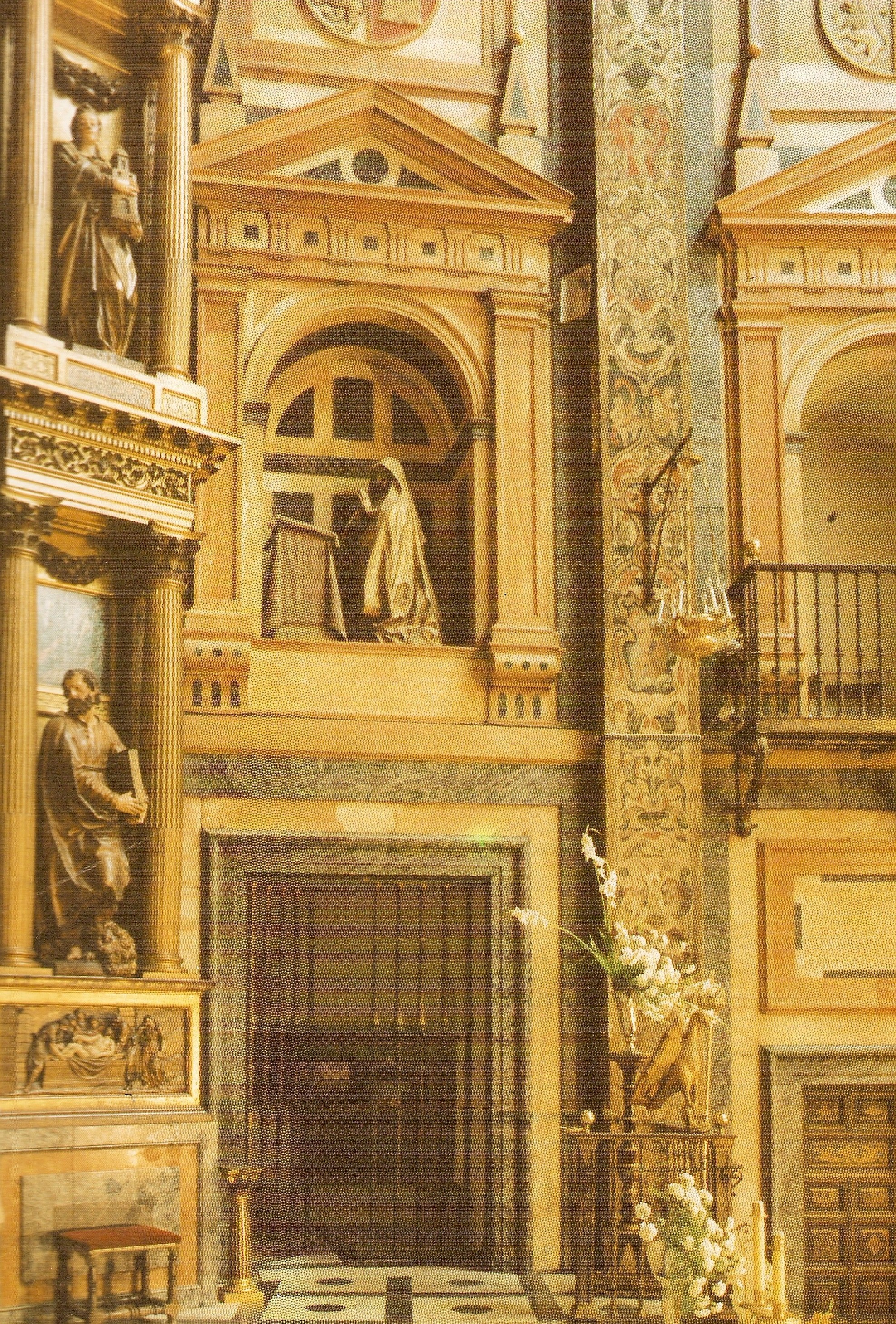 Sepulcro de la reina María de Aragón (1403-1445), que fue la primera esposa de Juan II de Castilla y la madre del rey Enrique IV, en la iglesia del Real Monasterio de Santa María de Guadalupe, provincia de Cáceres, (España).